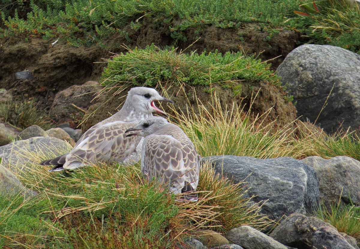 Original file: IMG_5712.TIF-single-new